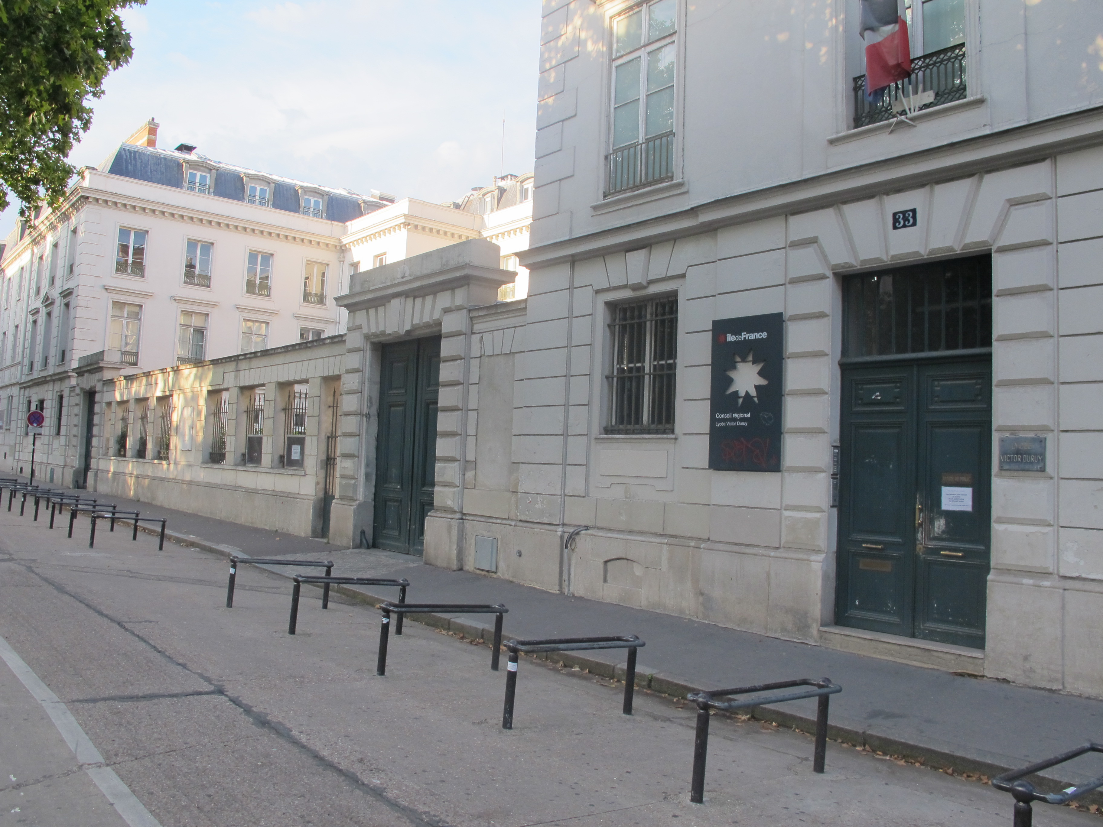 Façade du lycée Victor-Duruy (Paris)1.